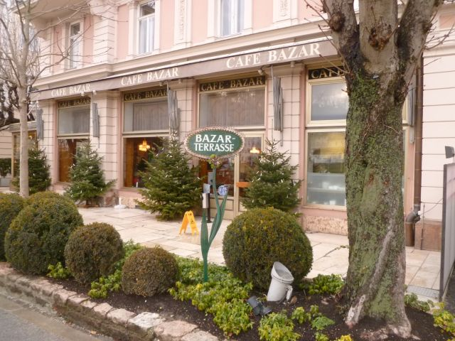 Café Bazar Terrasse